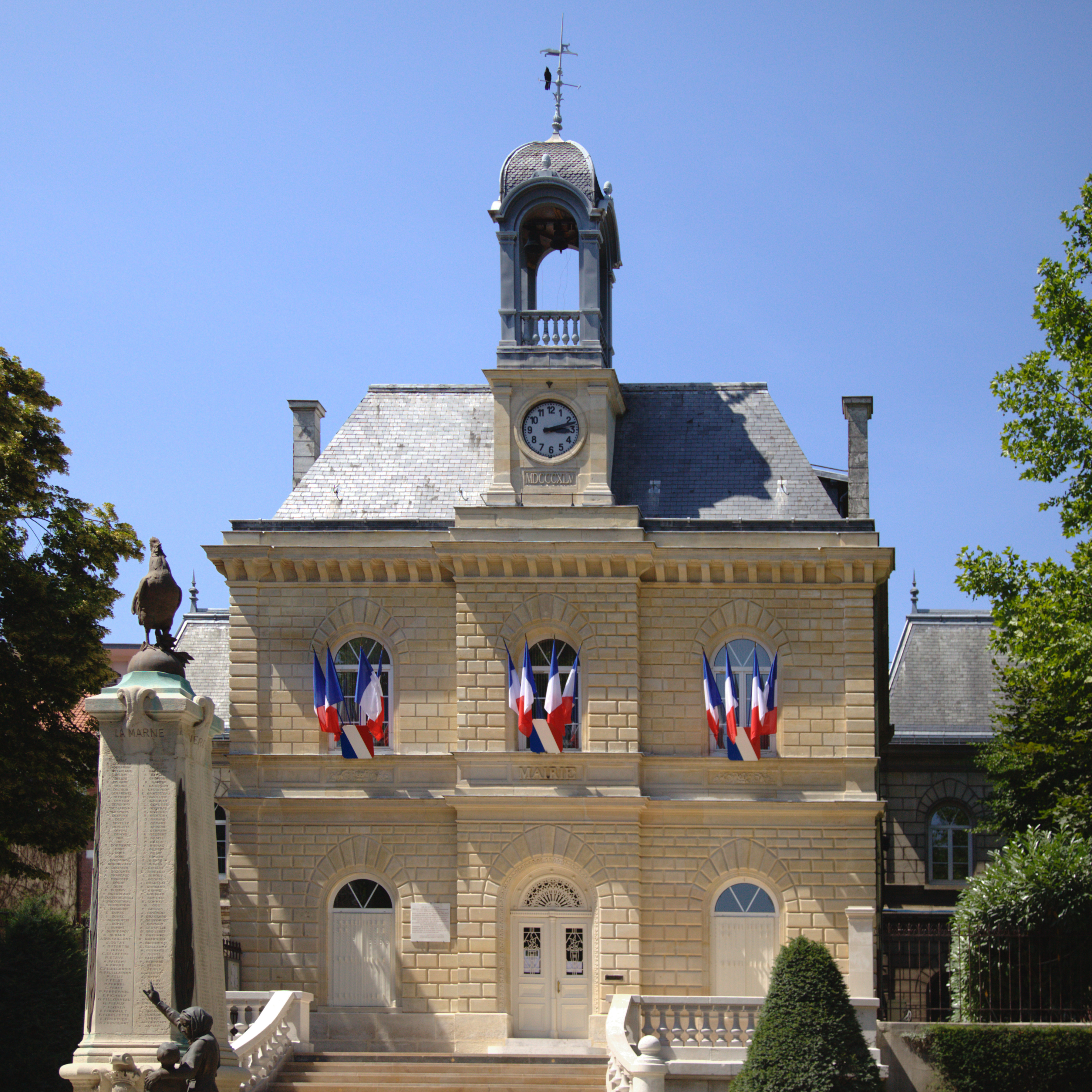 La marie de Gentilly, le jour de la fete nationale